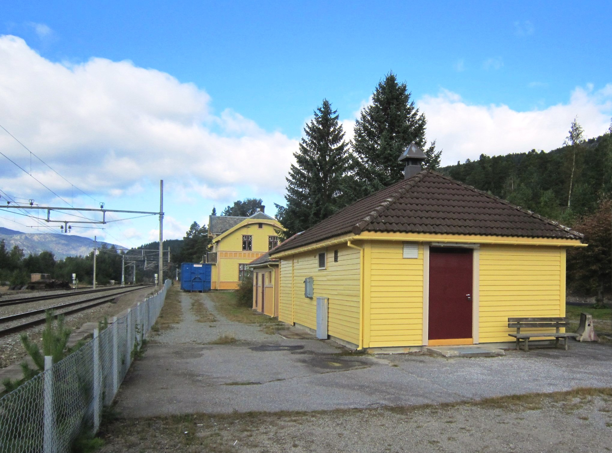 Gulsvik stasjon på Bergensbanen